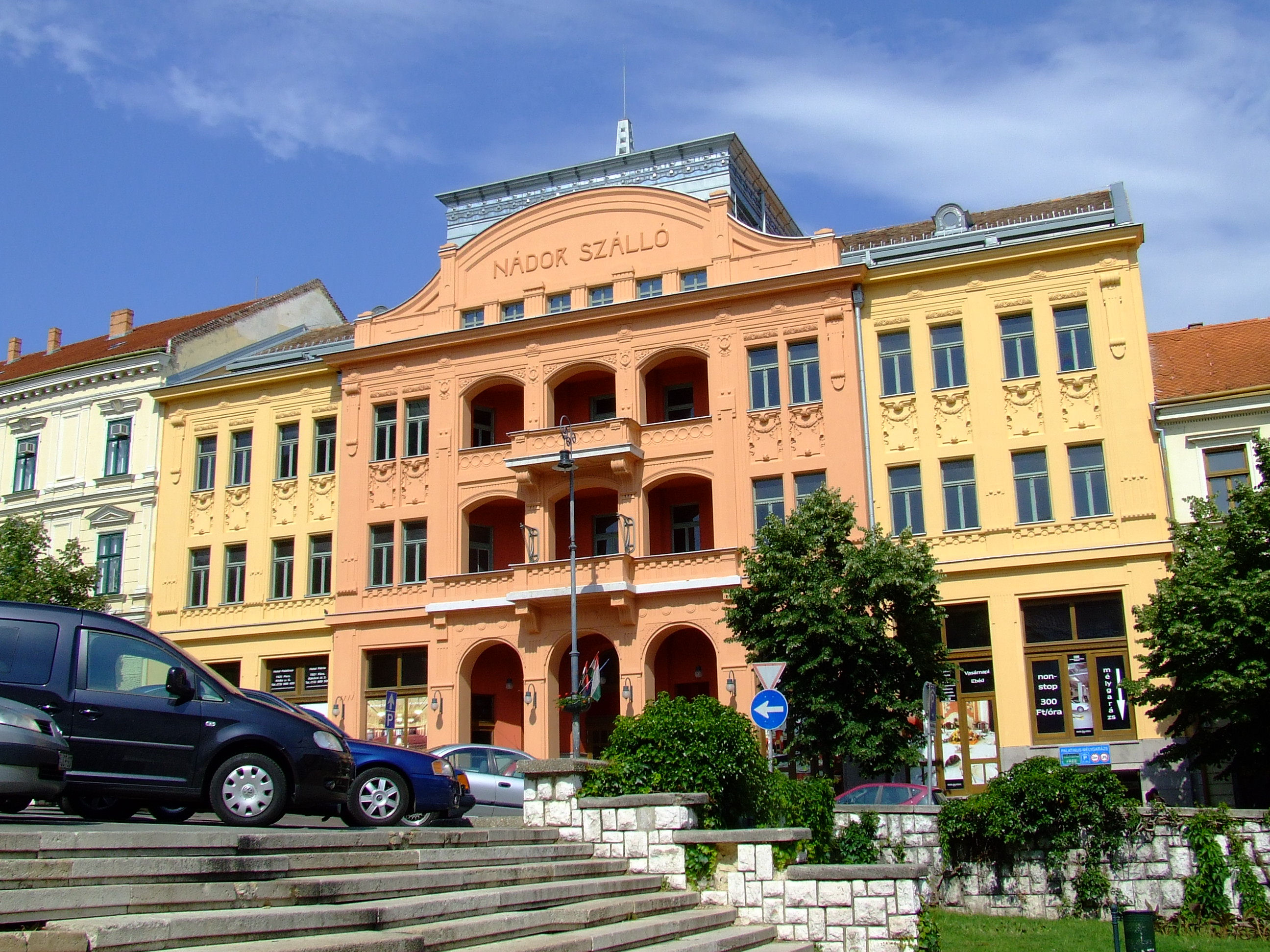 A Nádor Szálló Pécsen